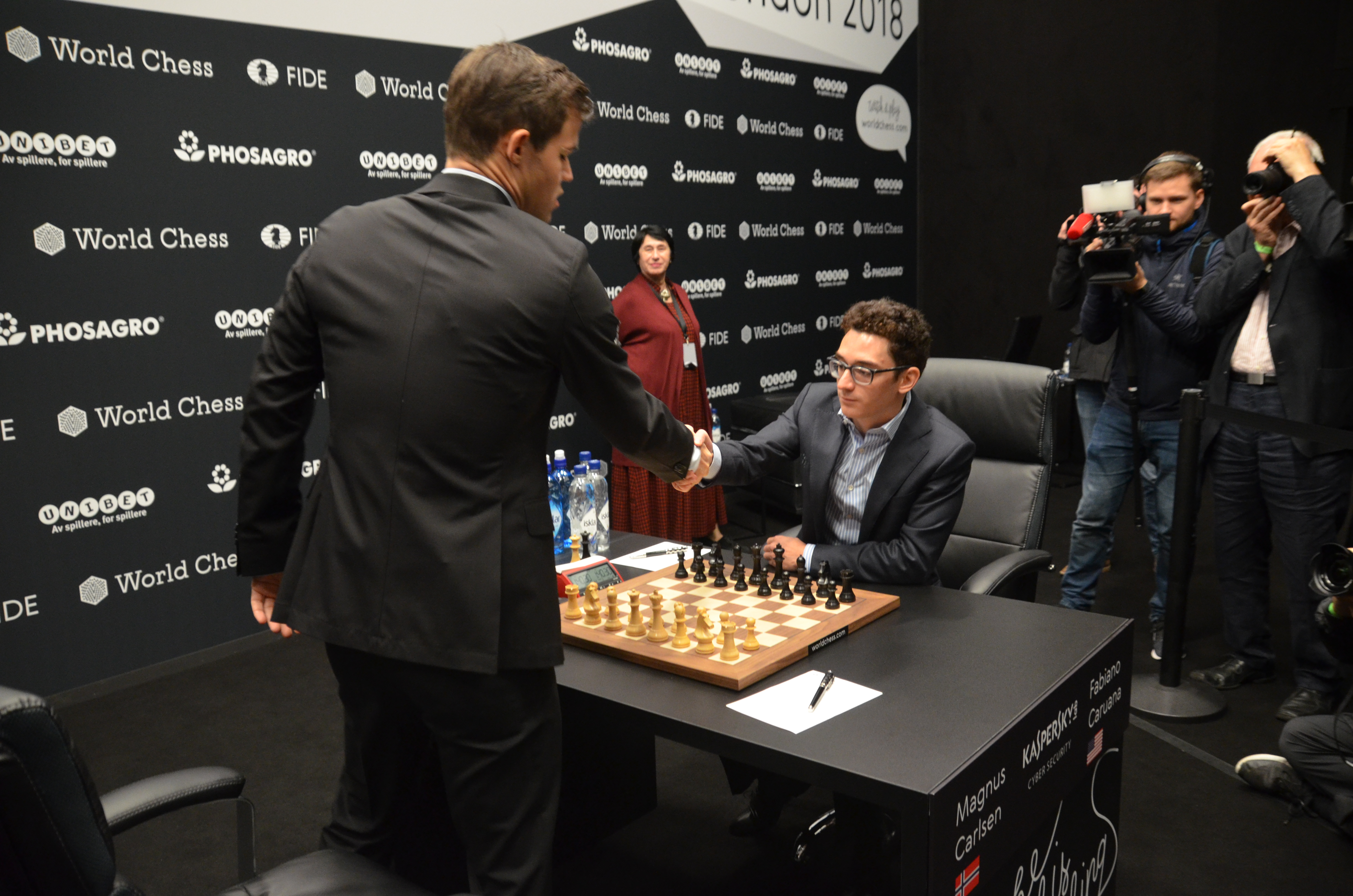 Saludo entre Carlsen y Caruana, momentos antes de comenzar la novena partida del match por el Campeonato del Mundo de Ajedrez, Londres 2018.